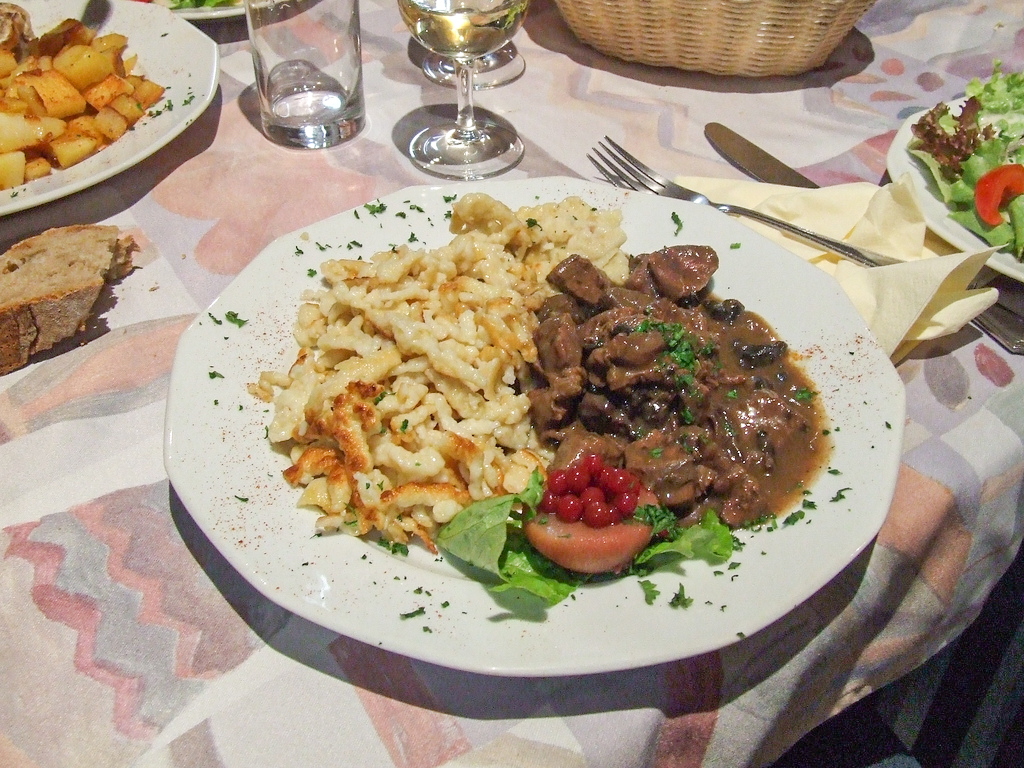 Civet de sanglier et spätzles en Alsace